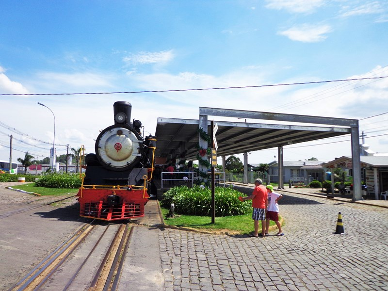 Estação de Carlos Barbosa Nova é onde para o trem do Vinho, operado pela Giardini Turismo, que percorre Bento Gonçalves - Garibaldi - Carlos Barbosa